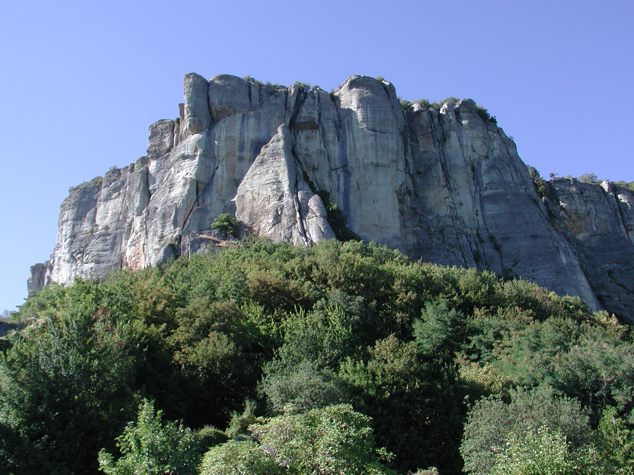 Pietra di Bismantova, appennino reggiano